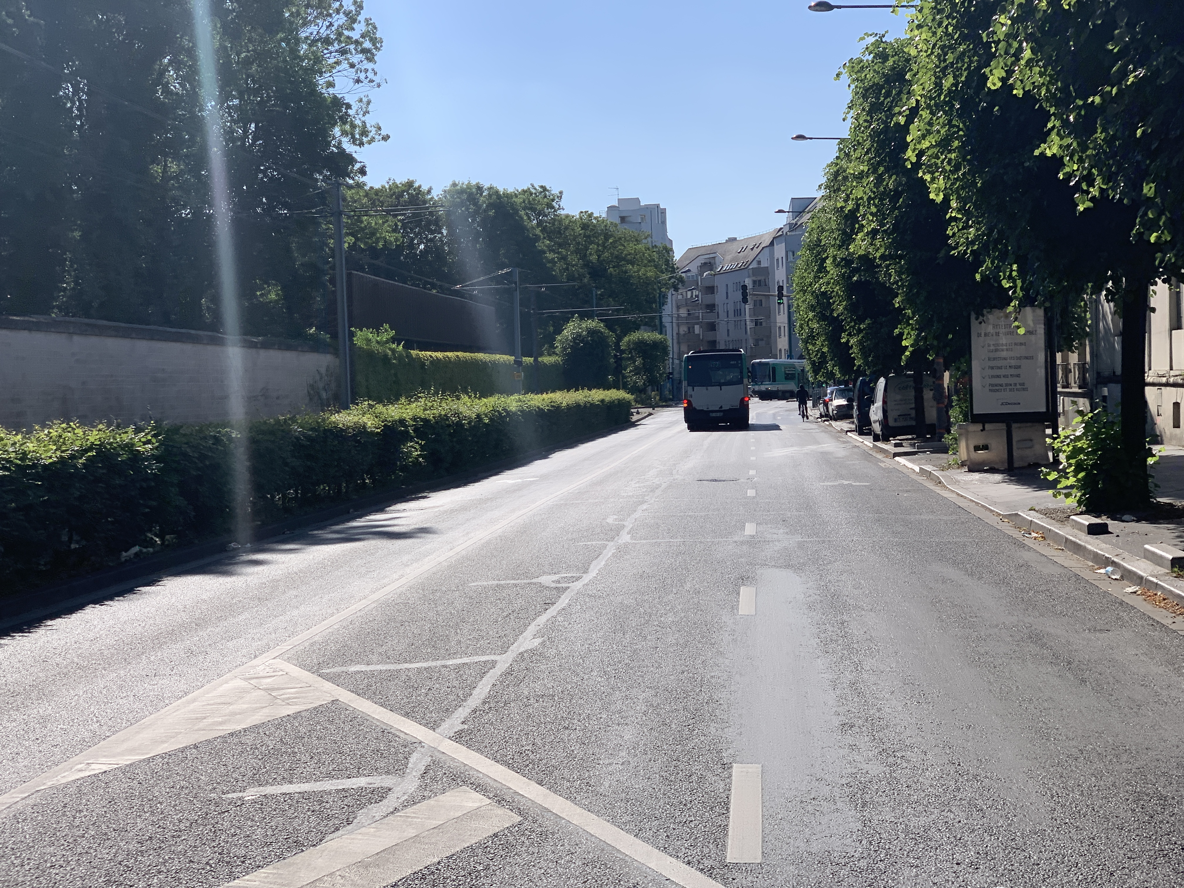 Rue de Strasbourg, Saint-Denis, Seine-Saint-Denis.